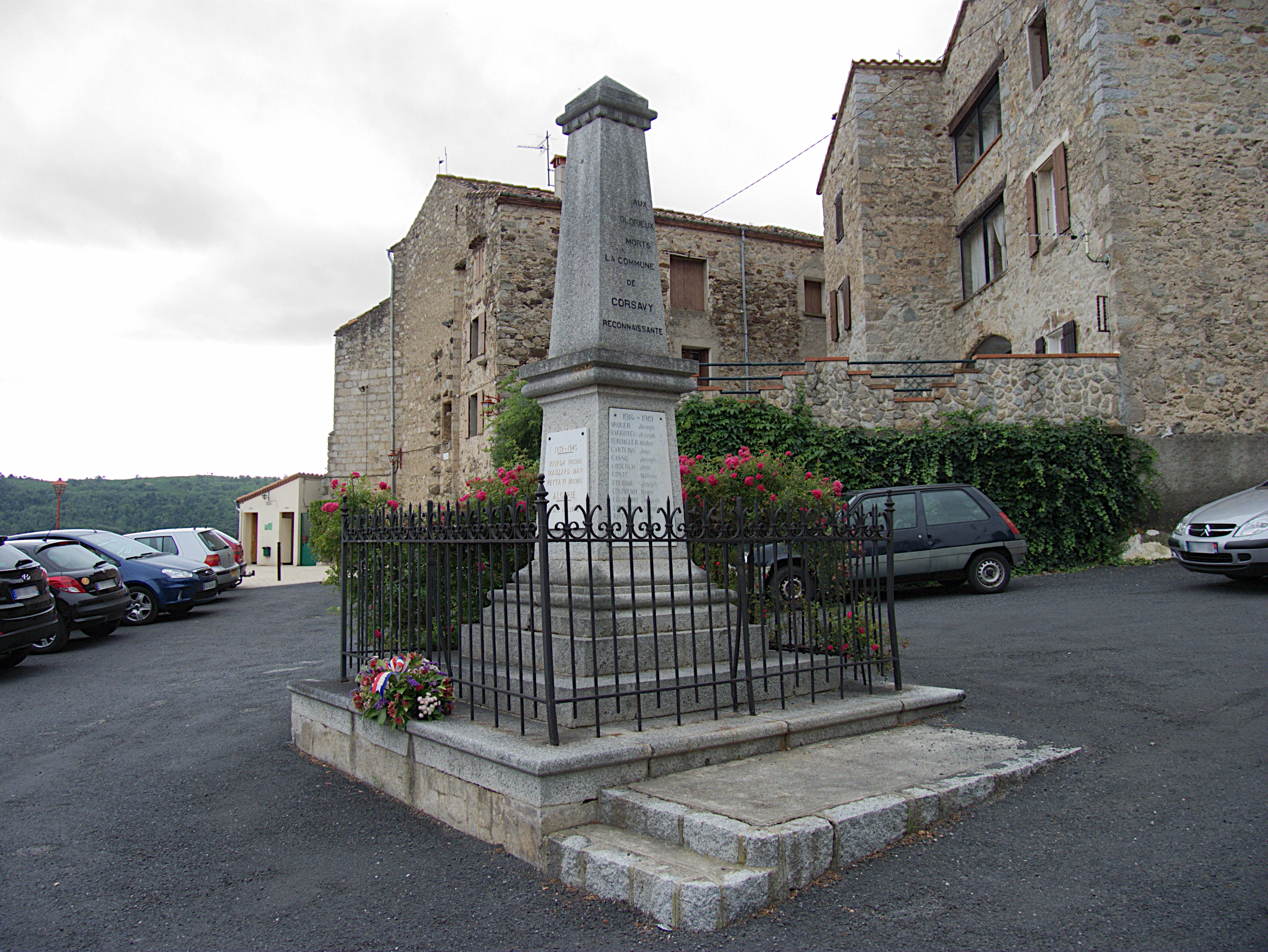 Monument aux morts, Corsavy (Pyrénées-Orientales, Languedoc-Roussillon, France)